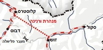 Darstellung zeigt dsa Netz der Rhätischen Bahn. Zeichnung erstellt 2004 von Benutzer:Sansculotte. Bild ist unter der GNU FDL zur weiteren Verwendung freigegeben. Quellenangabe und Beleg an erbeten.